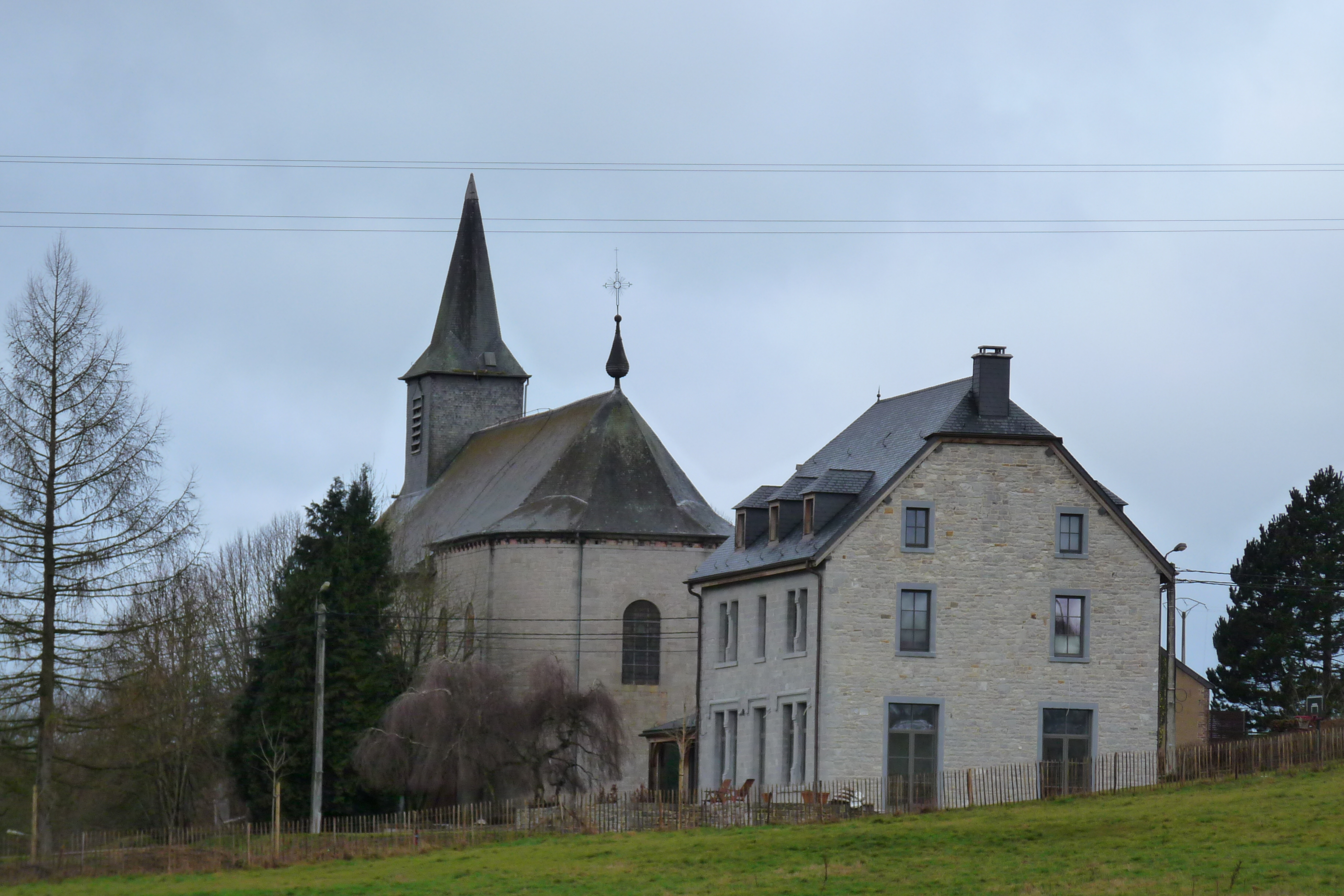 Vue de l'église Saint Pierre depuis le Thier de Huy